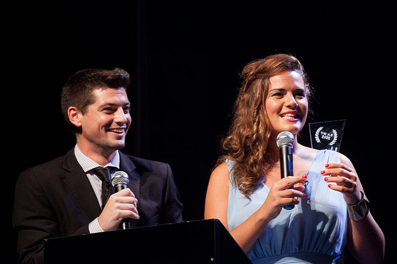 Actor Patricio Martín Ramos y Actriz Micaela Vázquez